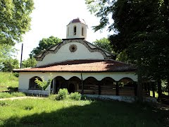 Намира се в с. Червен брег, Дупница, България